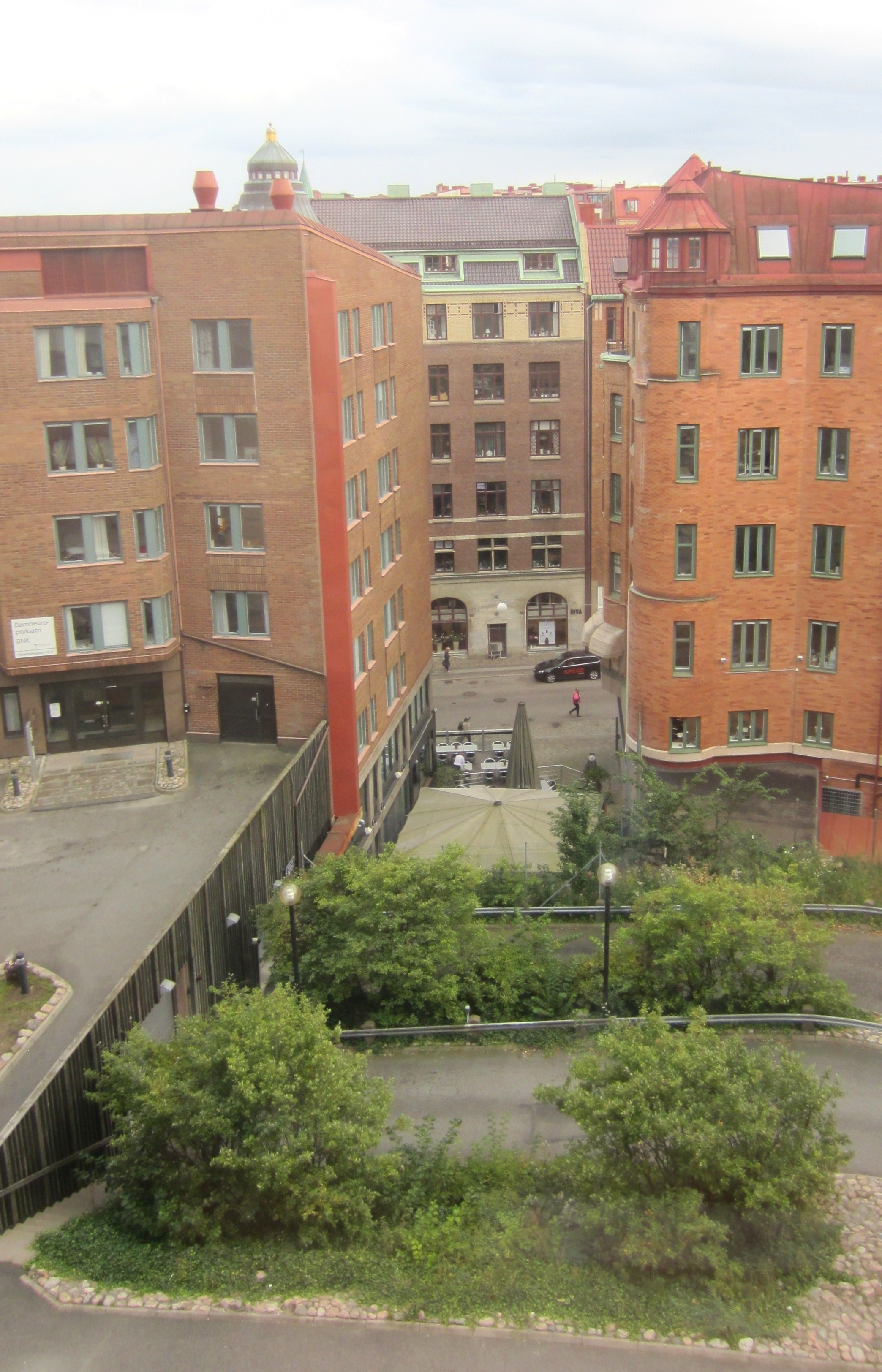 Södra Liden, som den ser ut 2013.